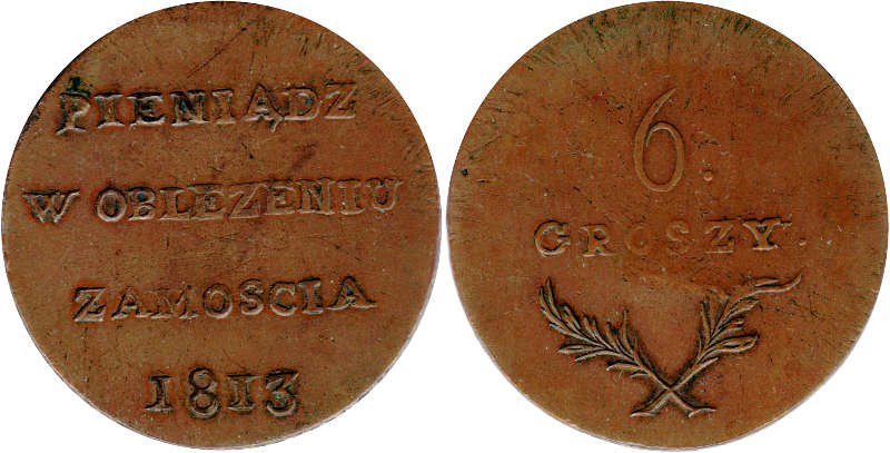 6 groszy 1813 bez napisu, z galazkami